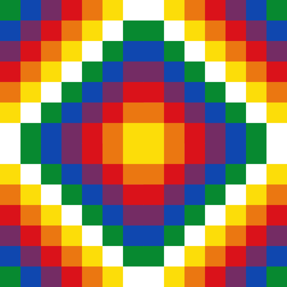 Variante de la wiphala conformada por cuatro wiphalas formando una chacana